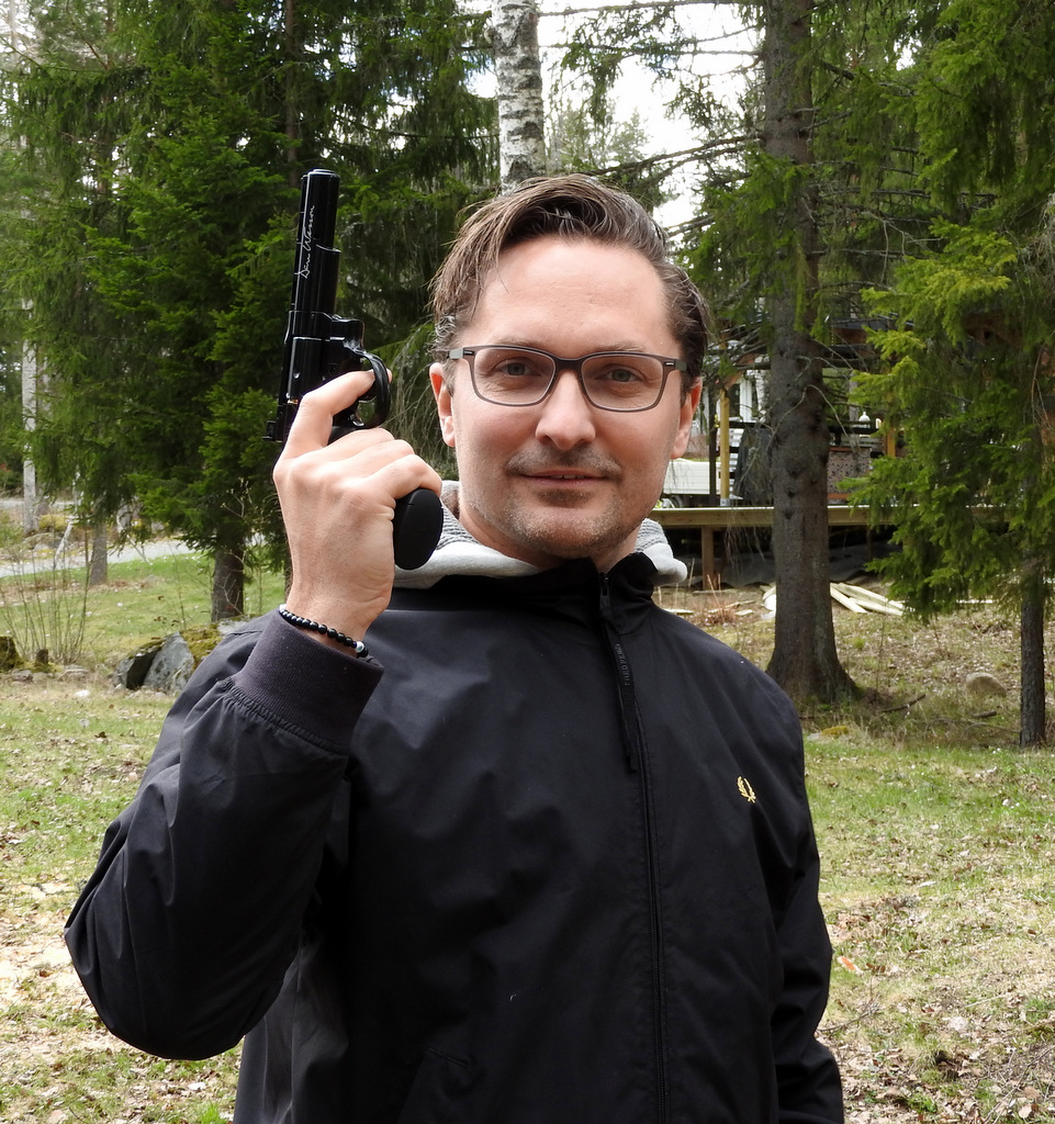 Roger Nordin med luftpistol